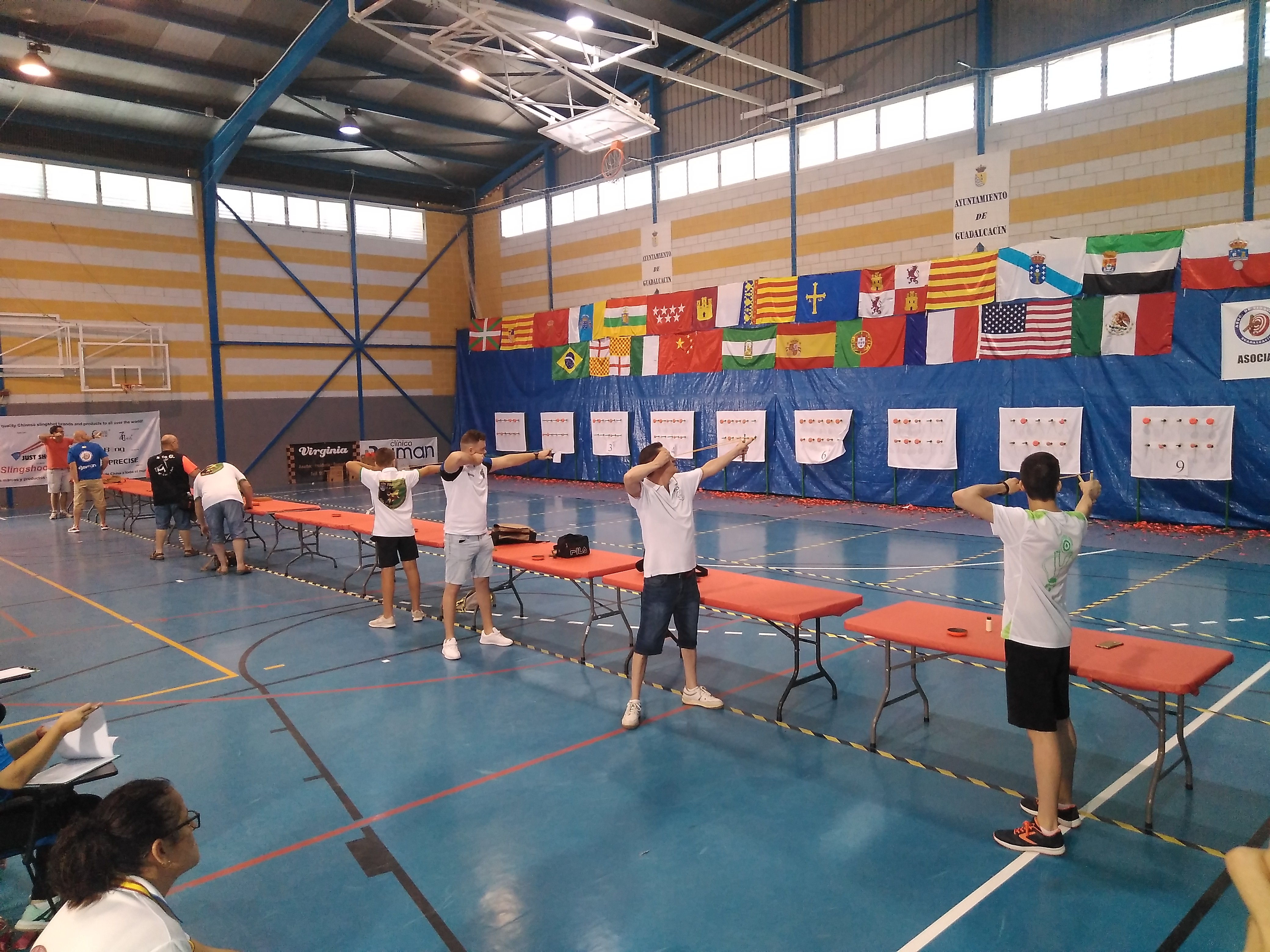 18º Campeonato Nacional de España de Tirachinas en Guadalcacín (Jerez de la Frontera, España)